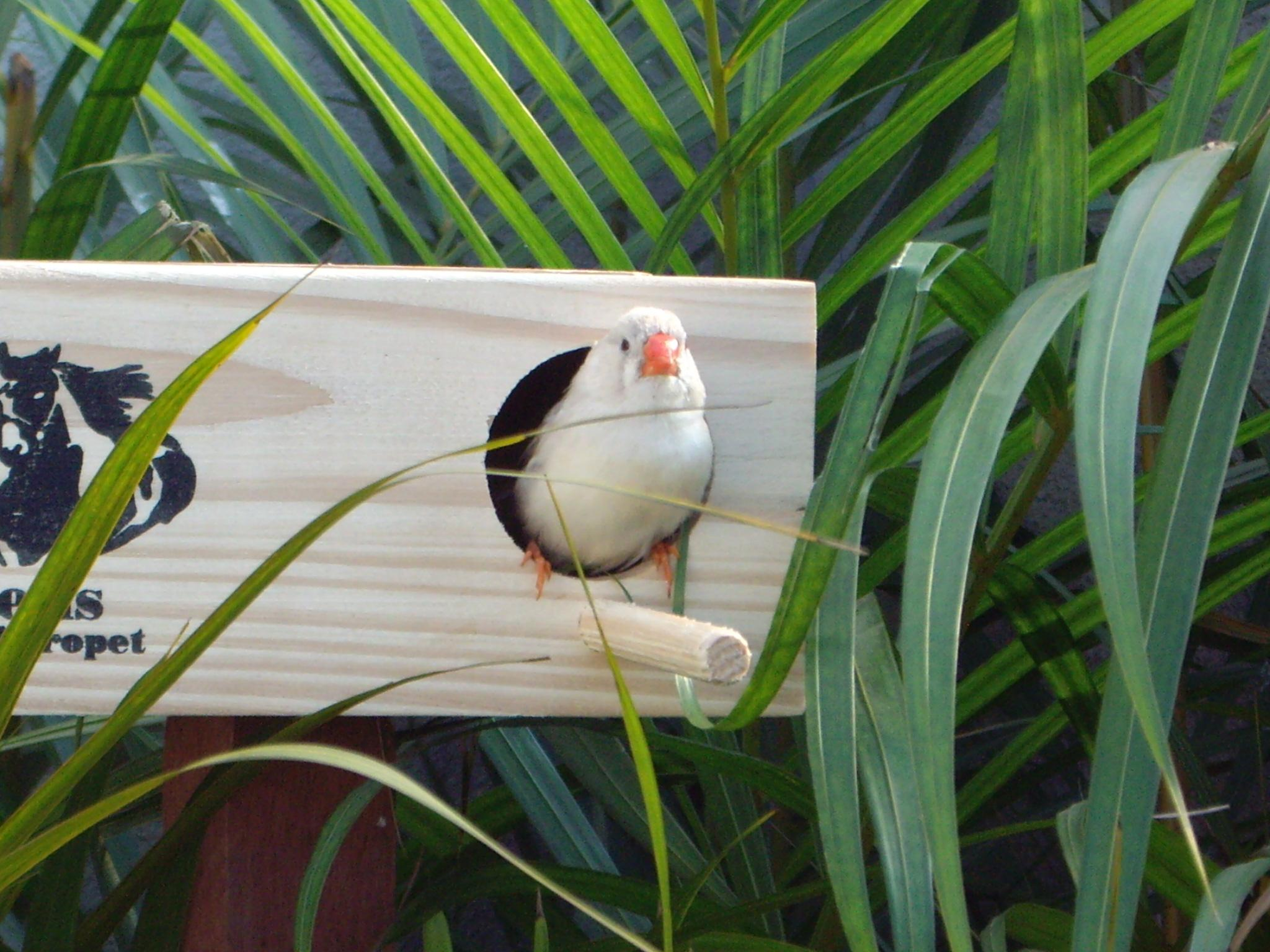 fêmea de mandarim branco